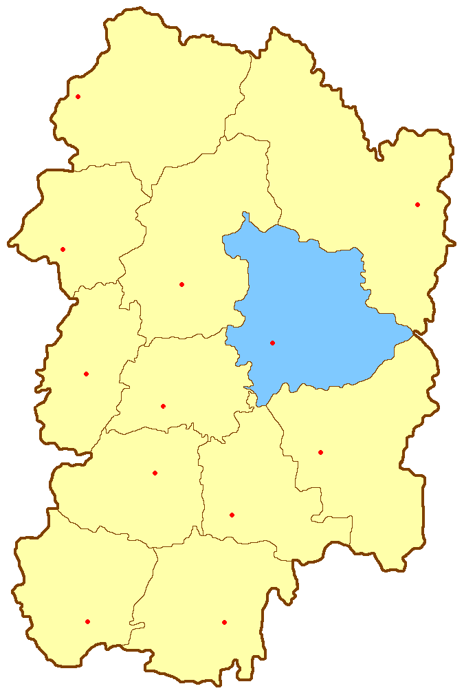 Спасский уезд на карте Рязанской губернии